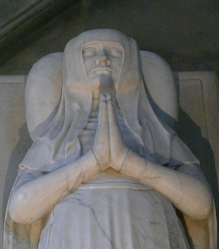 Jean de Liège et Robert Loisel, Statue (gisant) : Blanche de France, troisième fille de Charles IV et de Jeanne d'Evreux, épouse de Philippe, duc d'Orléans, vers 1382, détail, marbre, Saint-Denis, basilique Saint-Denis.